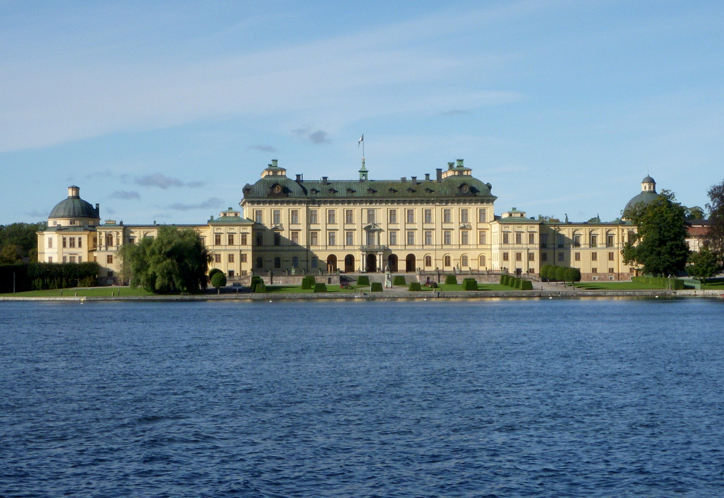 Drtottningholms slott, fasad mot öst